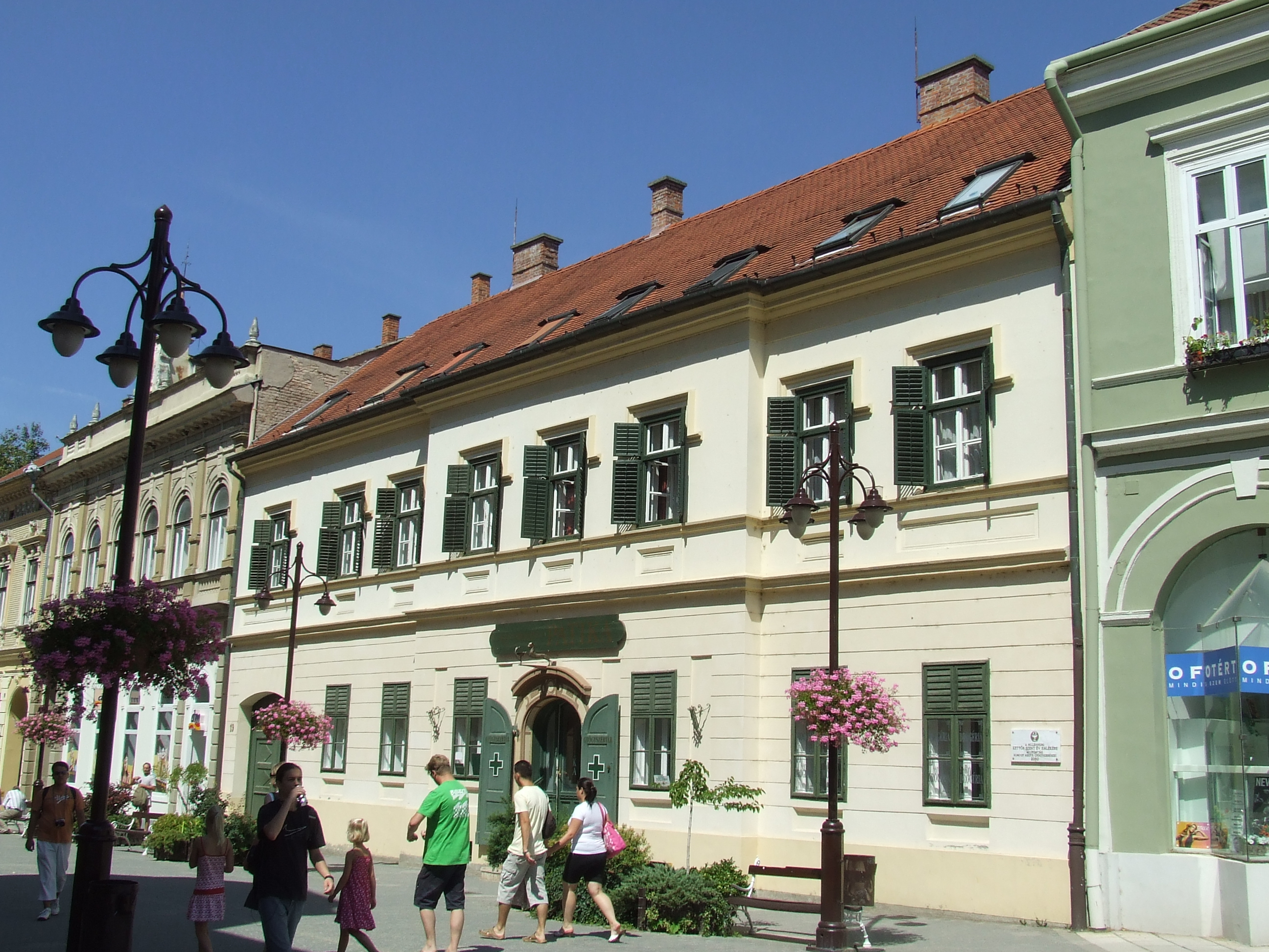 Az Arany Oroszlán patika Kaposváron. Épült 1774-ben barokk stílusban. A 19. században romantikus stílusban átalakították. Az épületben működő első gyógyszertárat Pyrker József alapította 1781-ben. Csokonai Vitéz Mihály is járt itt. Itt dolgozott Rippl-Rónai József patikussegédként és itt festette a Fiatal nő estélyi virágos ruhában című képét, melynek sikere tette lehetővé, hogy beiratkozhatott a müncheni festőakadémiára. - Fő utca, 19. Kaposvár This is a photo of a monument in Hungary, Identifier: 7917